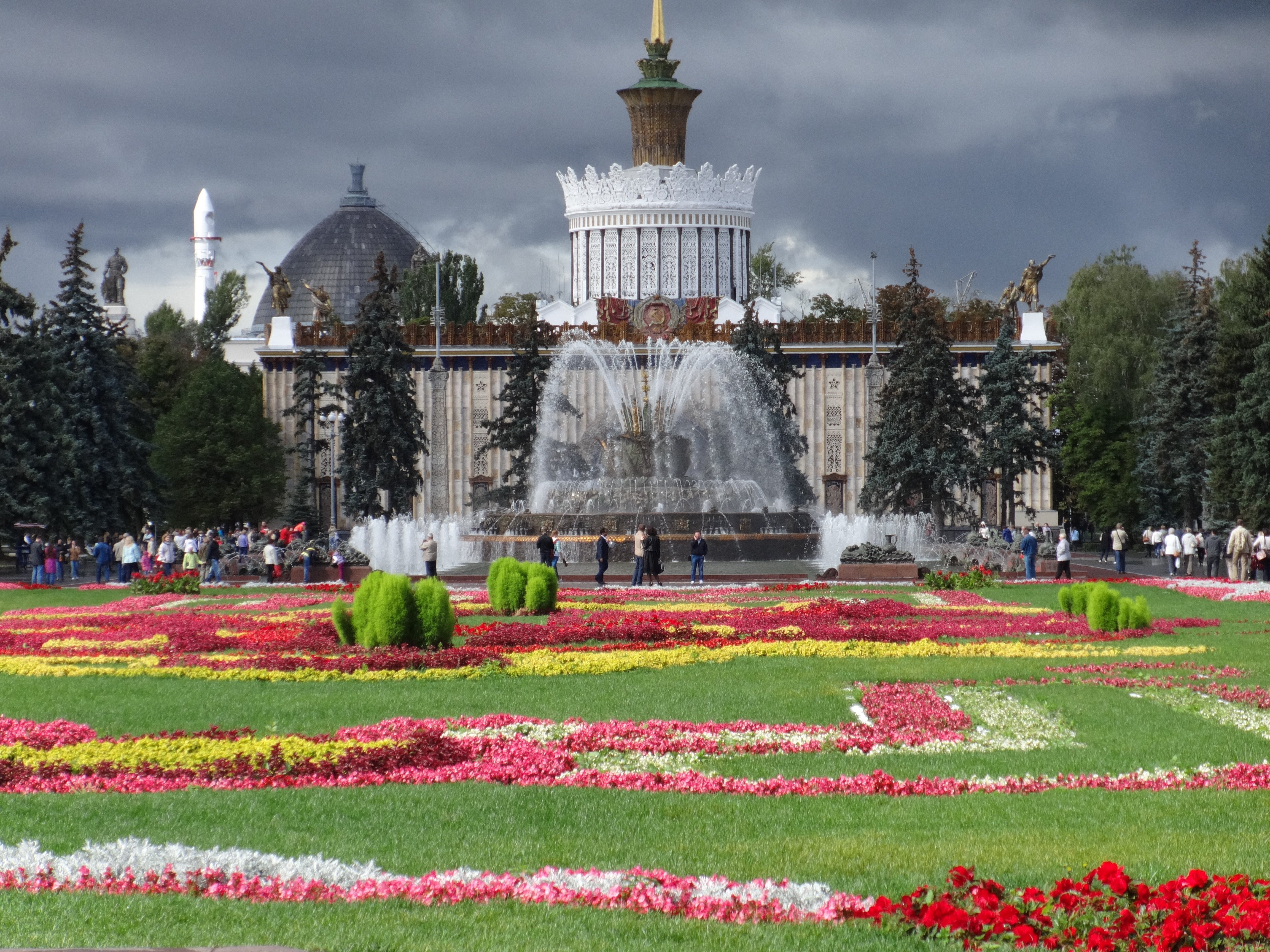 Система цветочных партеров (Москва и Московская область, Москва, Мира проспект, 115)